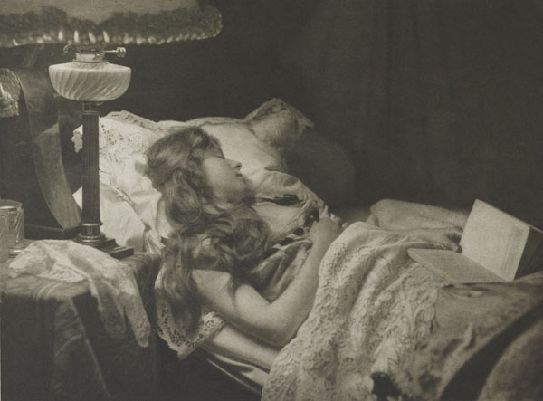 Constant Puyo: Eingeschlafen; Photogravure, veröffentlicht (published) in: Die Kunst der Photographie, 1897